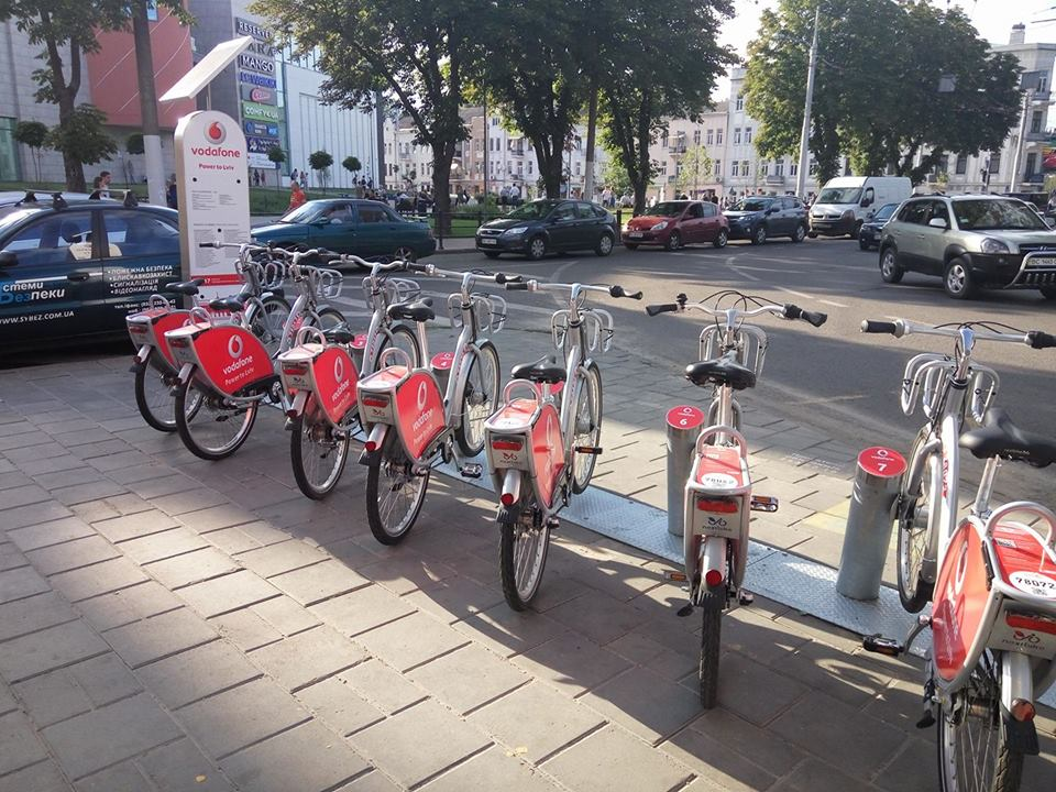 NextBike bike sharing service in Lviv, Ukraine